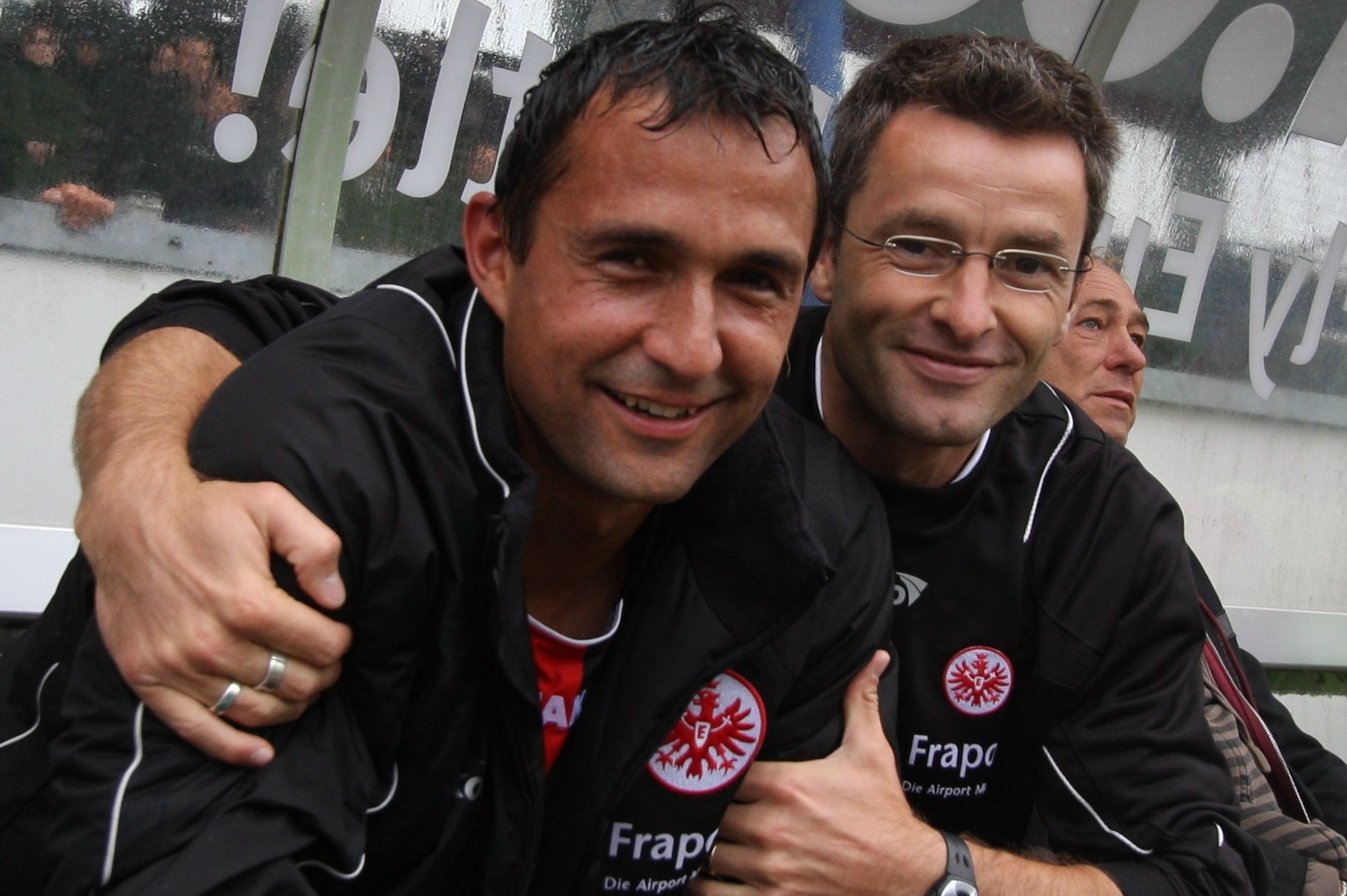 Tuncay Nadaroglu (links) mit Co-Trainer Alex Schur nach seiner Auswechslung in der 89. Minute in seinem letzten Spiel am 6.6.2009, Eintracht Frankfurt U23 gegen den SSV Ulm